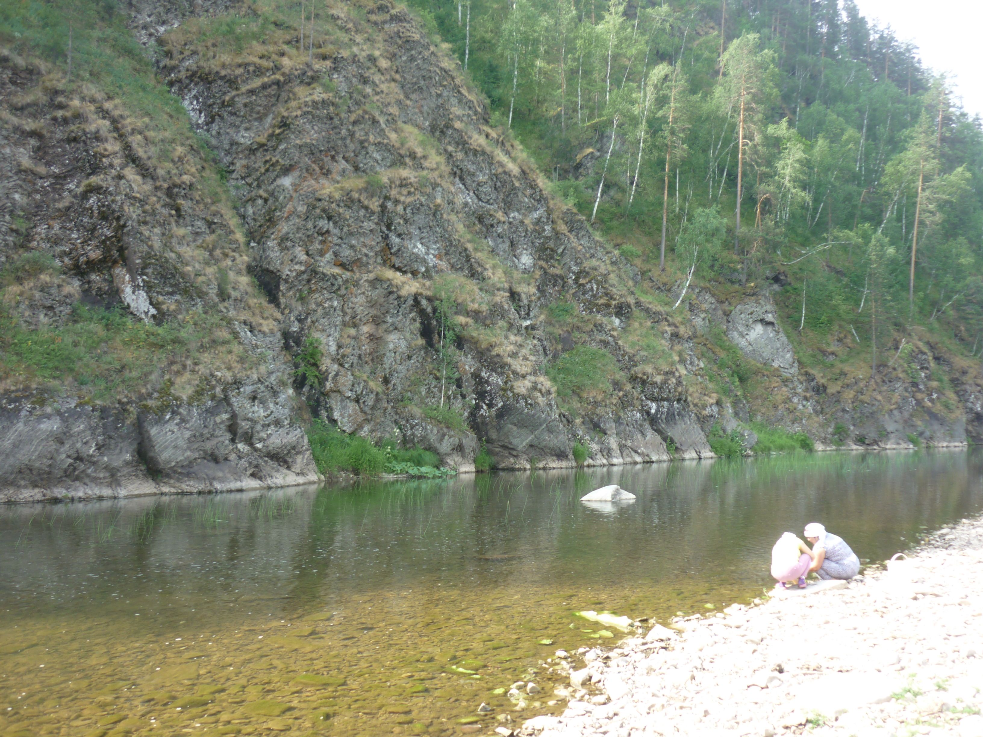 Башҡортса: Бөрйән районы Үрге Нөгөш ауылы эргәһендә Нөгөш йылғаһы